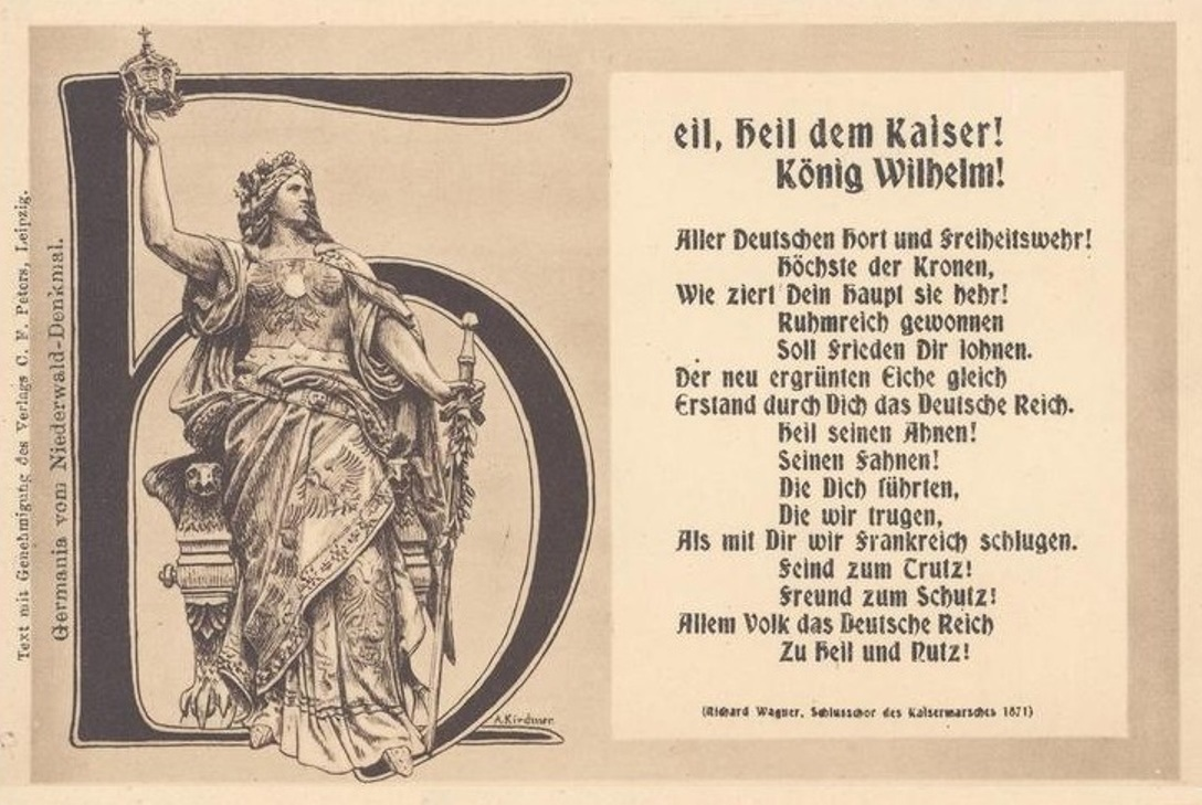 Postkarte mit Bild der Germania des Niederwalddenkmals und Text aus Richard Wagners Kaisermarsch